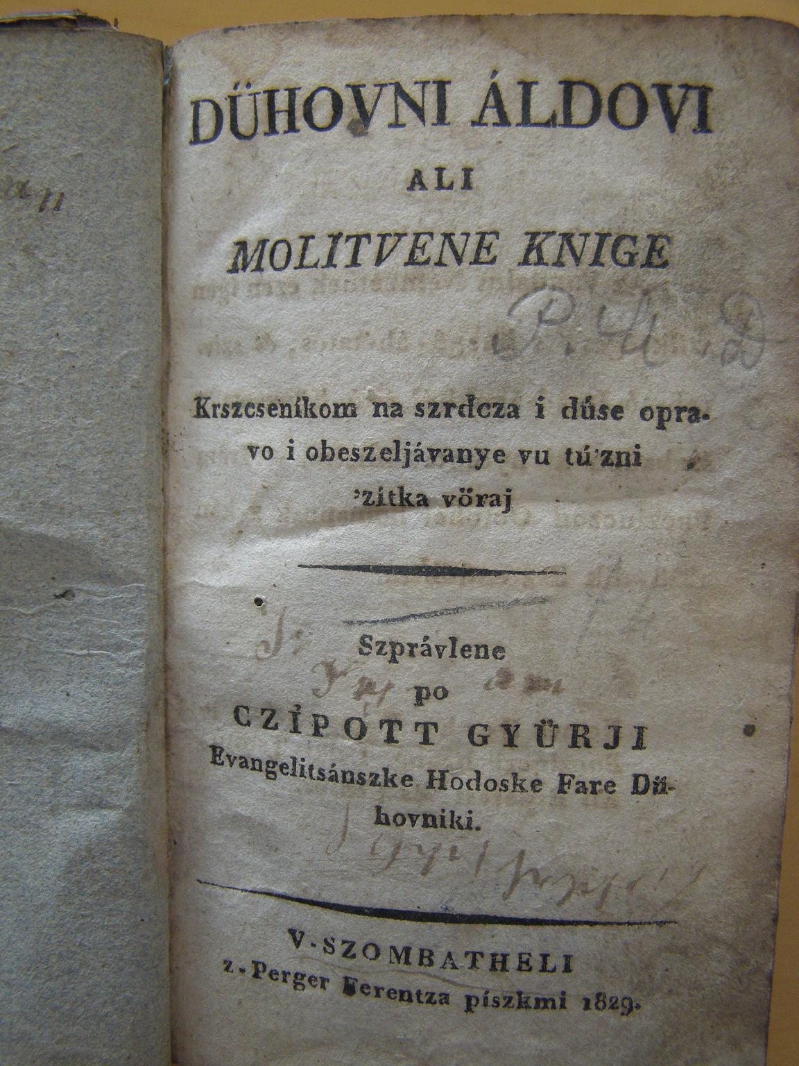 Dühovni Áldovi (Ghostly Blessing), prekmurian (prekmurščina) evangelic prayer-book, by György Czipott (1829)